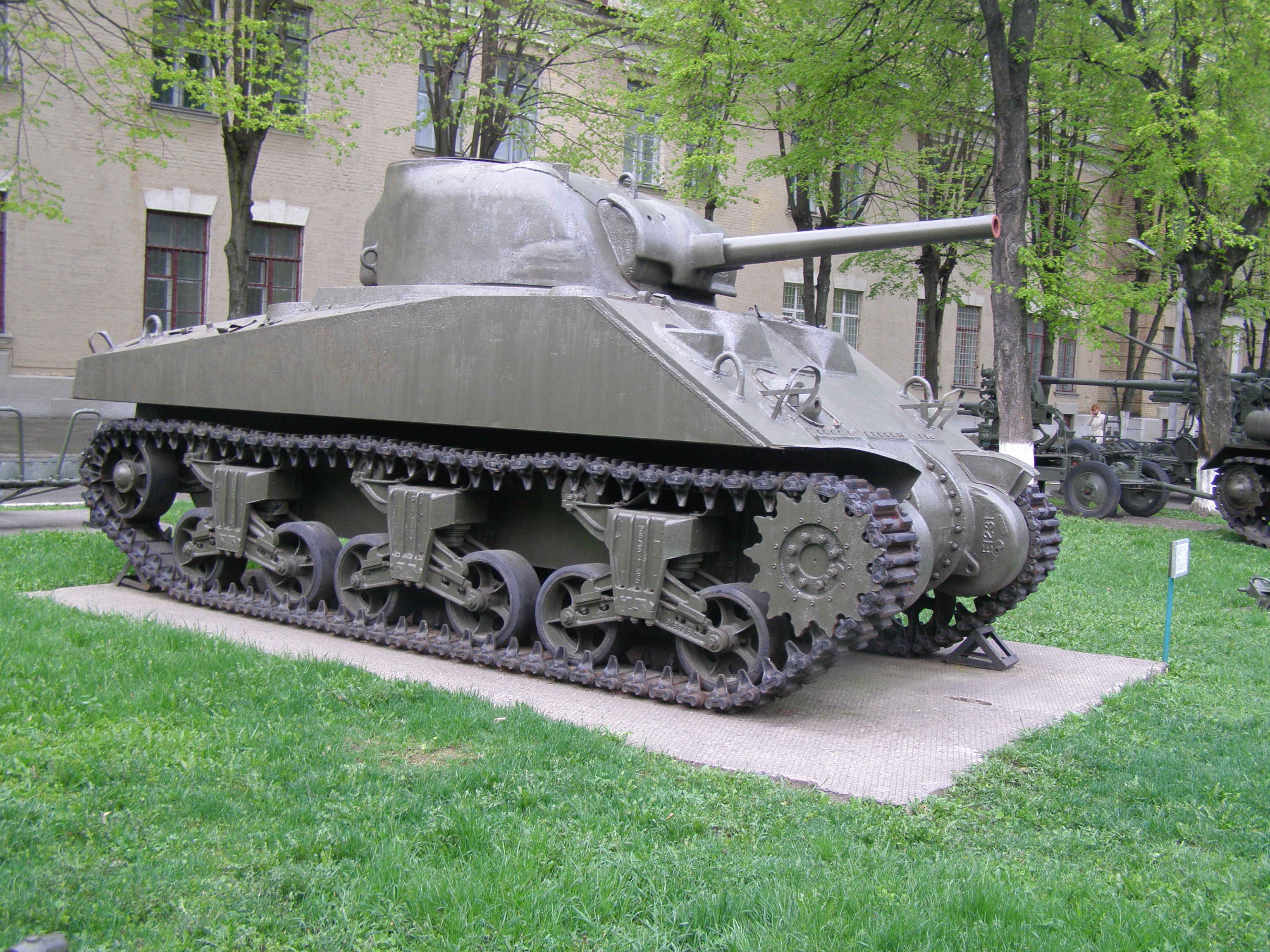 M4A2 Sherman на майданчику Національного університету оборони України в Києві